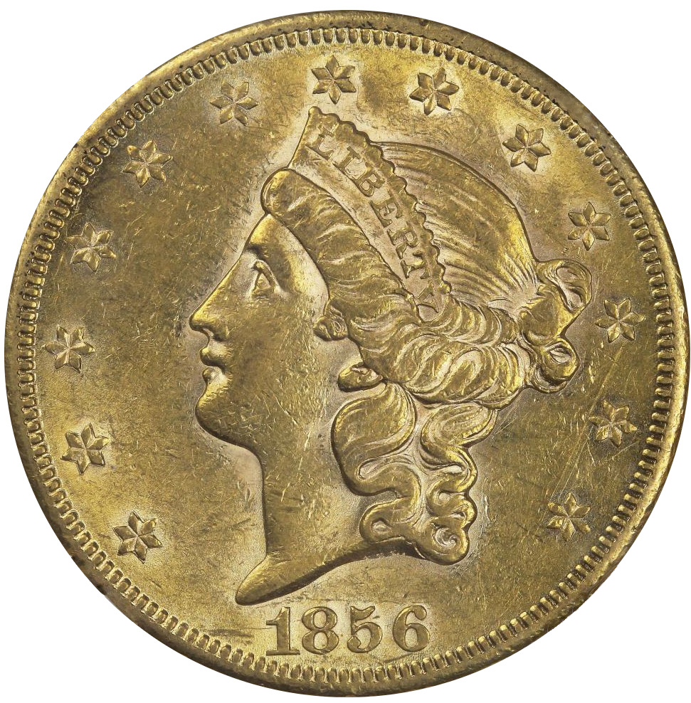 1856-S double eagle obverse